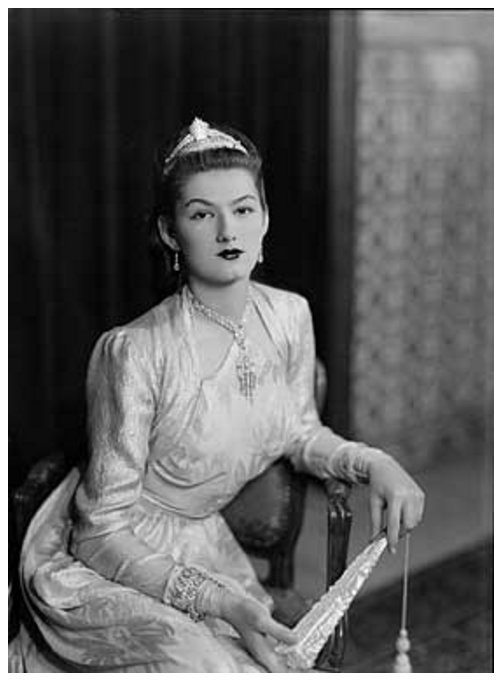 Necla en el dia de su boda (1943)